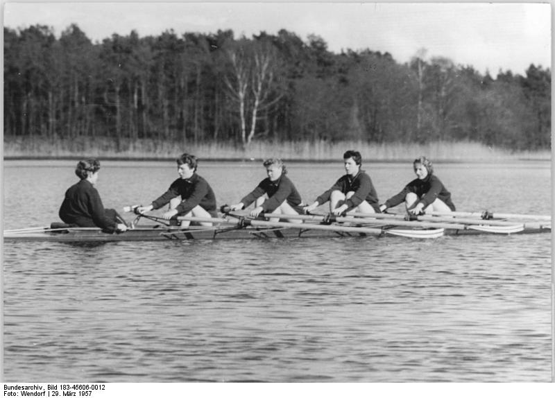 Berlin, SC Dynamo, Doppelvierer Zentralbild Wendorf Wen-Ho.. 29.3.1957 Vor dem Saisonstart der Wassersportler Überall bereiten sich in diesen Tagen auf den Gewässern Berlins und der Republik die Wassersportler auf die kommende Saison 1957 vor. Wir besuchten die Ruderer des SC Dynamo Berlin in Karolinenhof, um sie bei ihrer vorbereitenden Trainingsarbeit zu beobachten. UBz: Der Doppelvierer der Frauen mit Steuermamm während des Trainings.